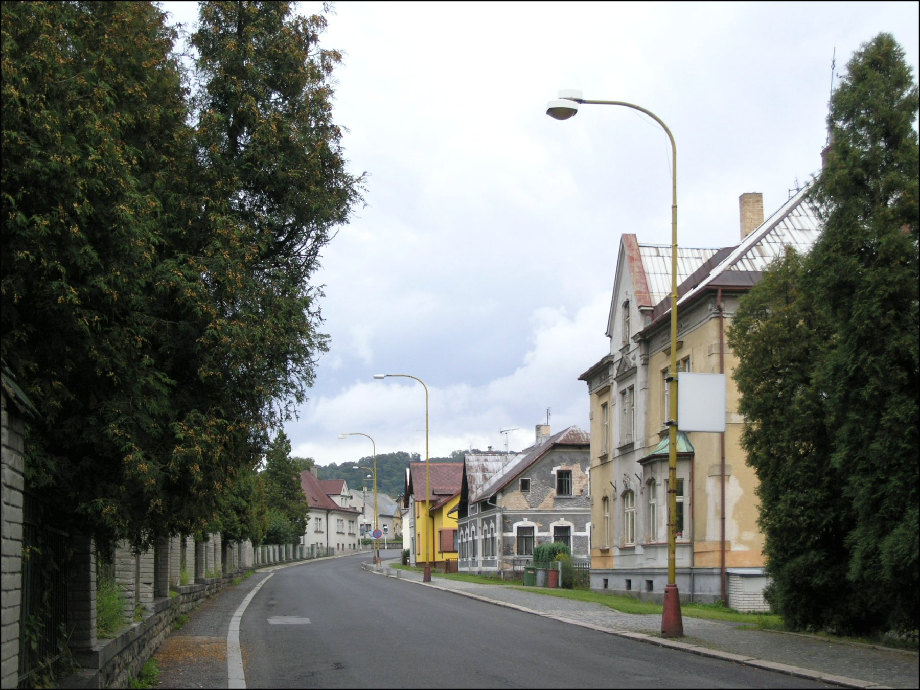 Velký Šenov